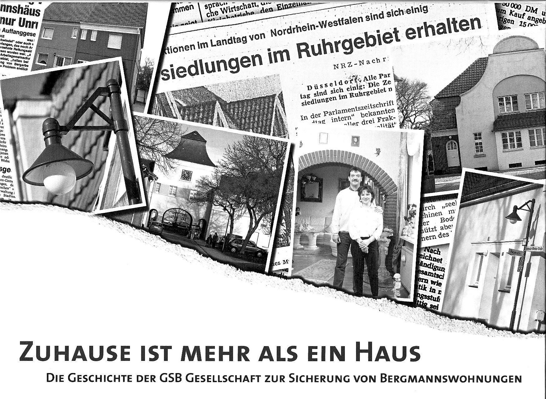 Buchdeckel 20-jährige Tätigkeit der GSB